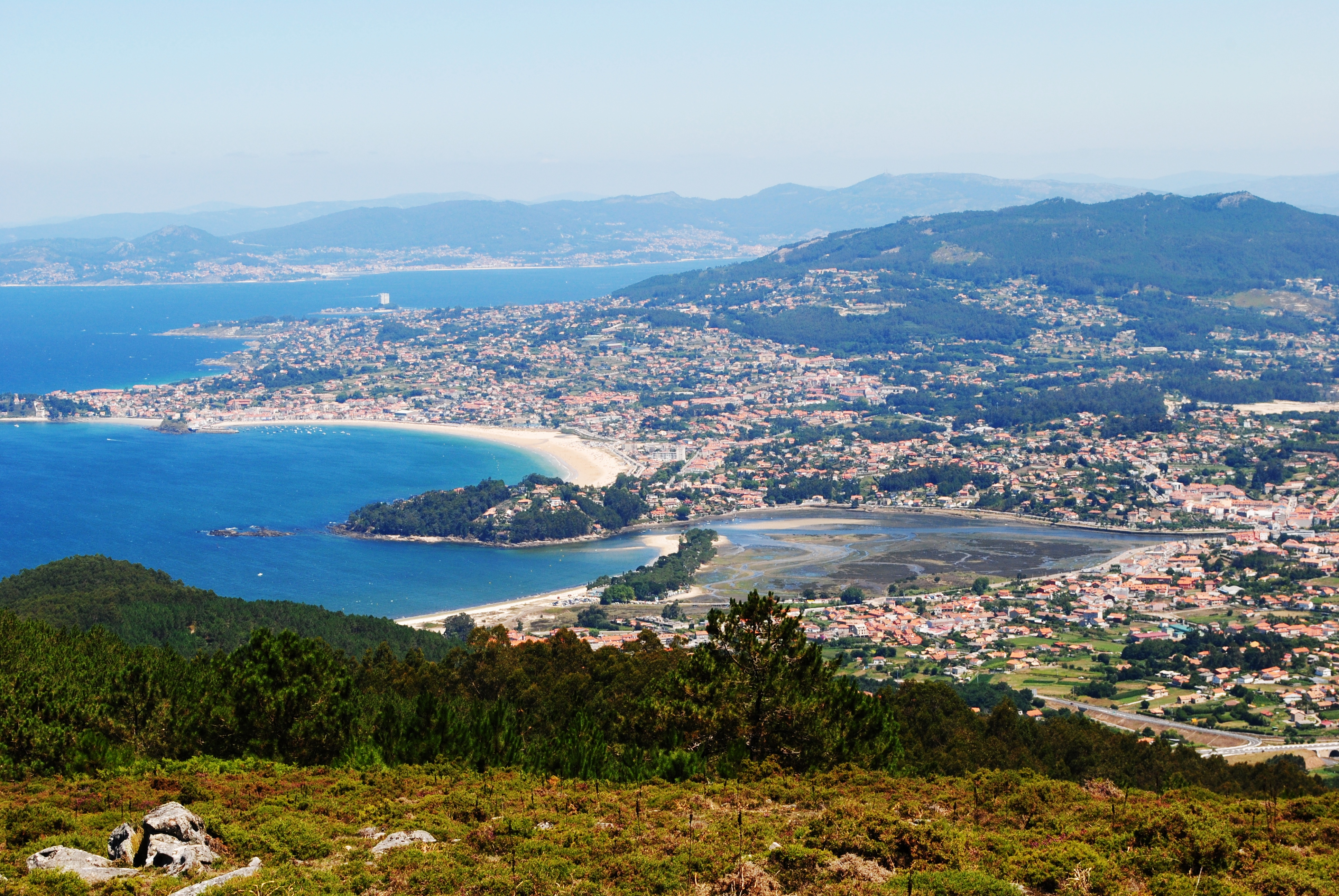 Desembocadura do Miñor, monte Lourido, praia América...